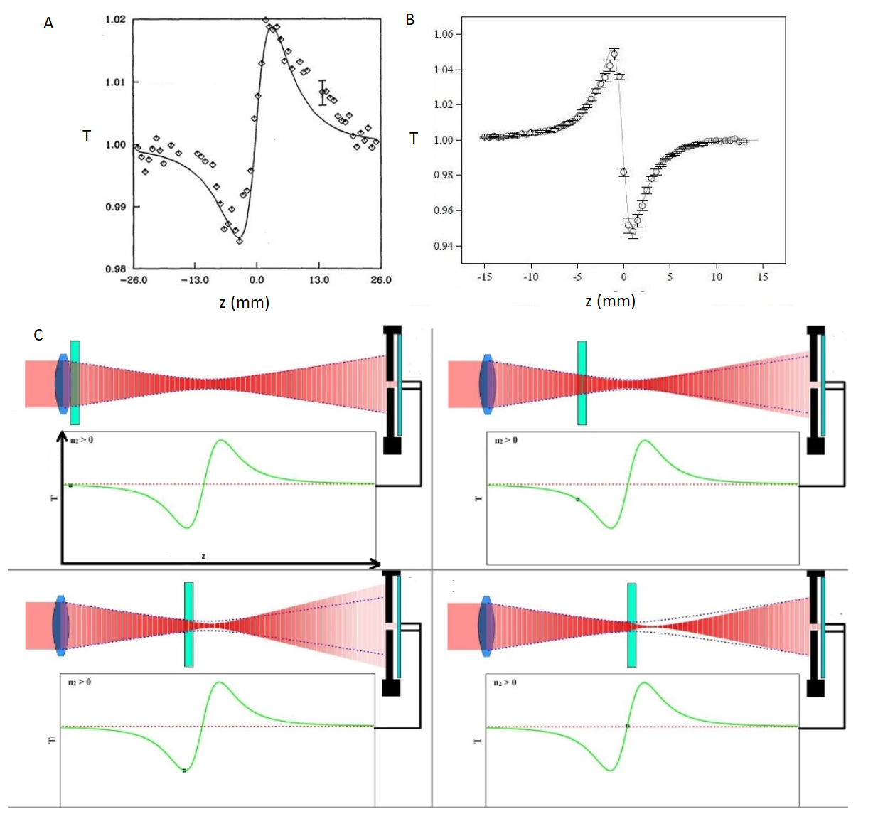 Schemat pomiaru zskan